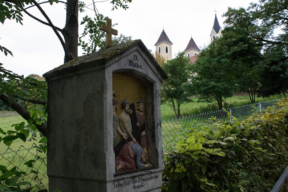 Station IX